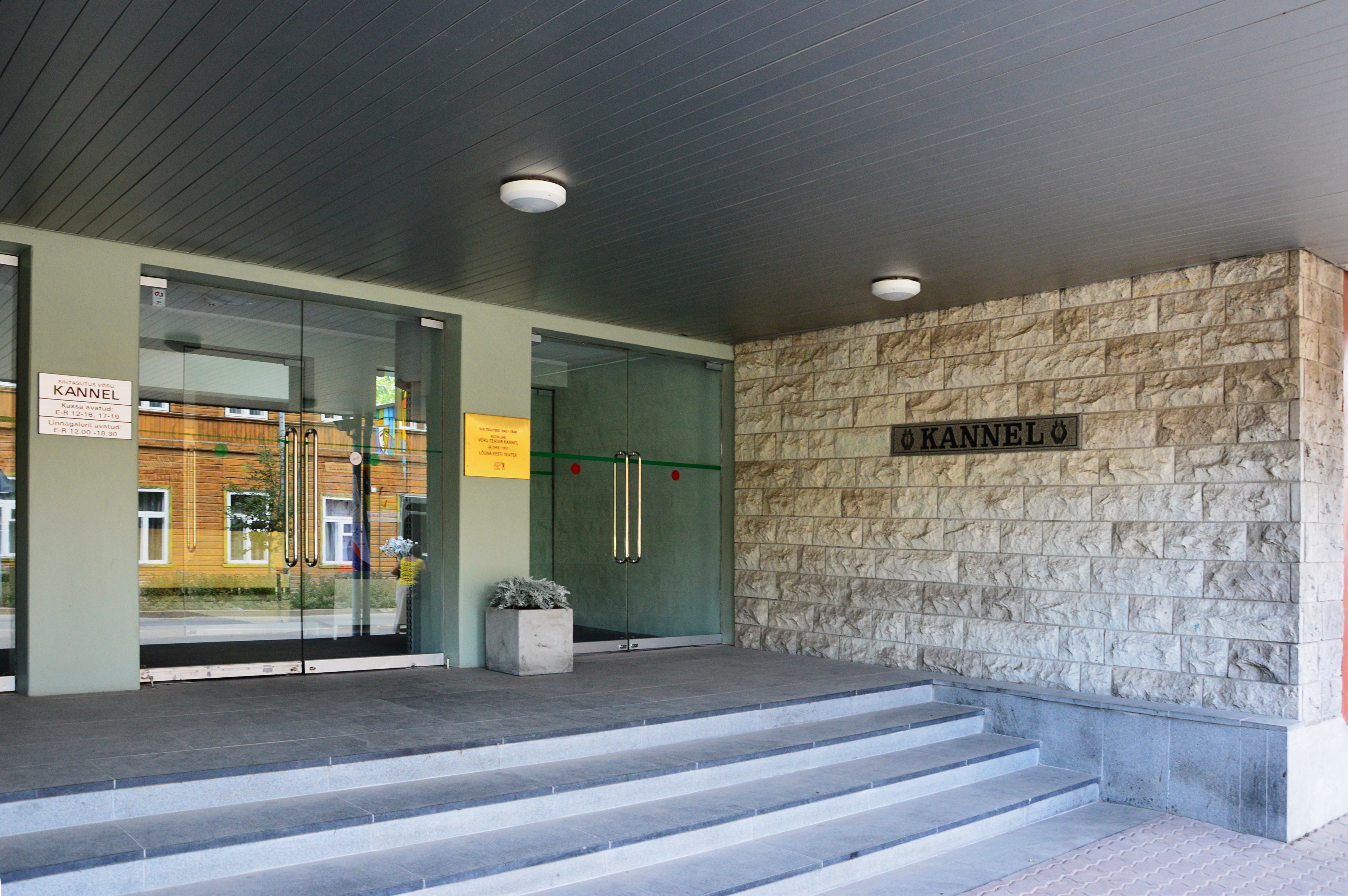 Võru Kannel. Sissepääs.